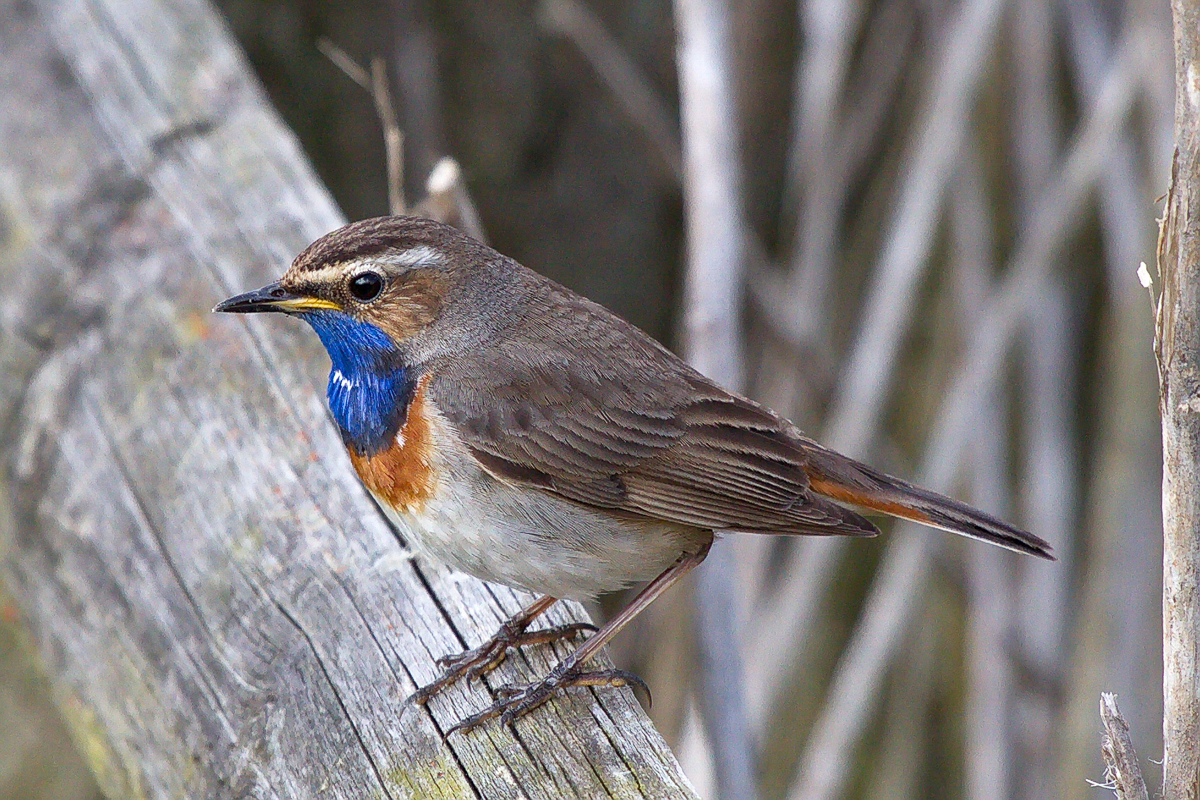 Gesehen auf der Plattform im NSG Sehlendorfer Binnensee und Umgebung, Schleswig-Holstein